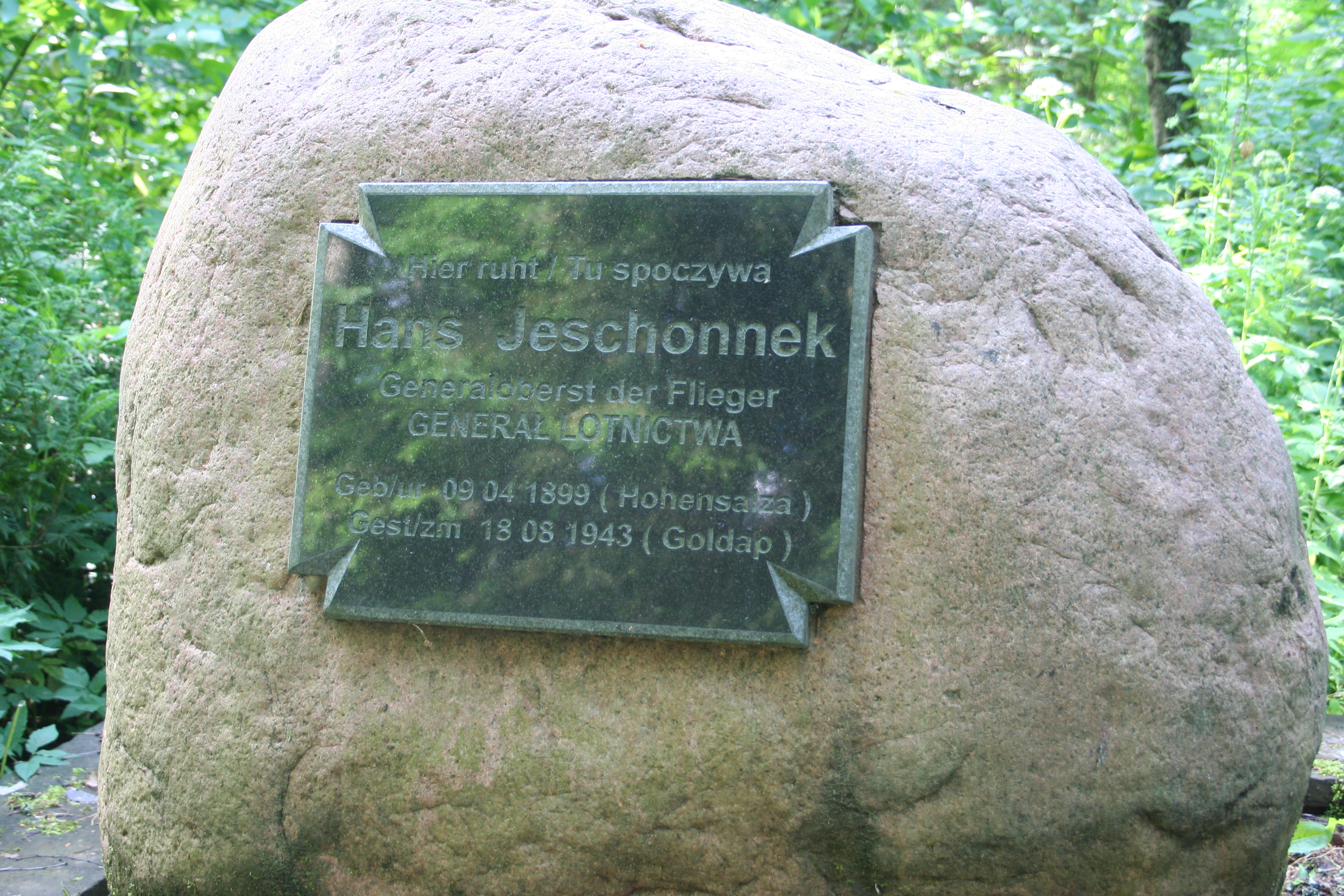 Der Grabstein von Generaloberst Hans Jeschonnek, nicht weit von der Stadt Gołdap / Masuren am Ufer vom Goldaper See.